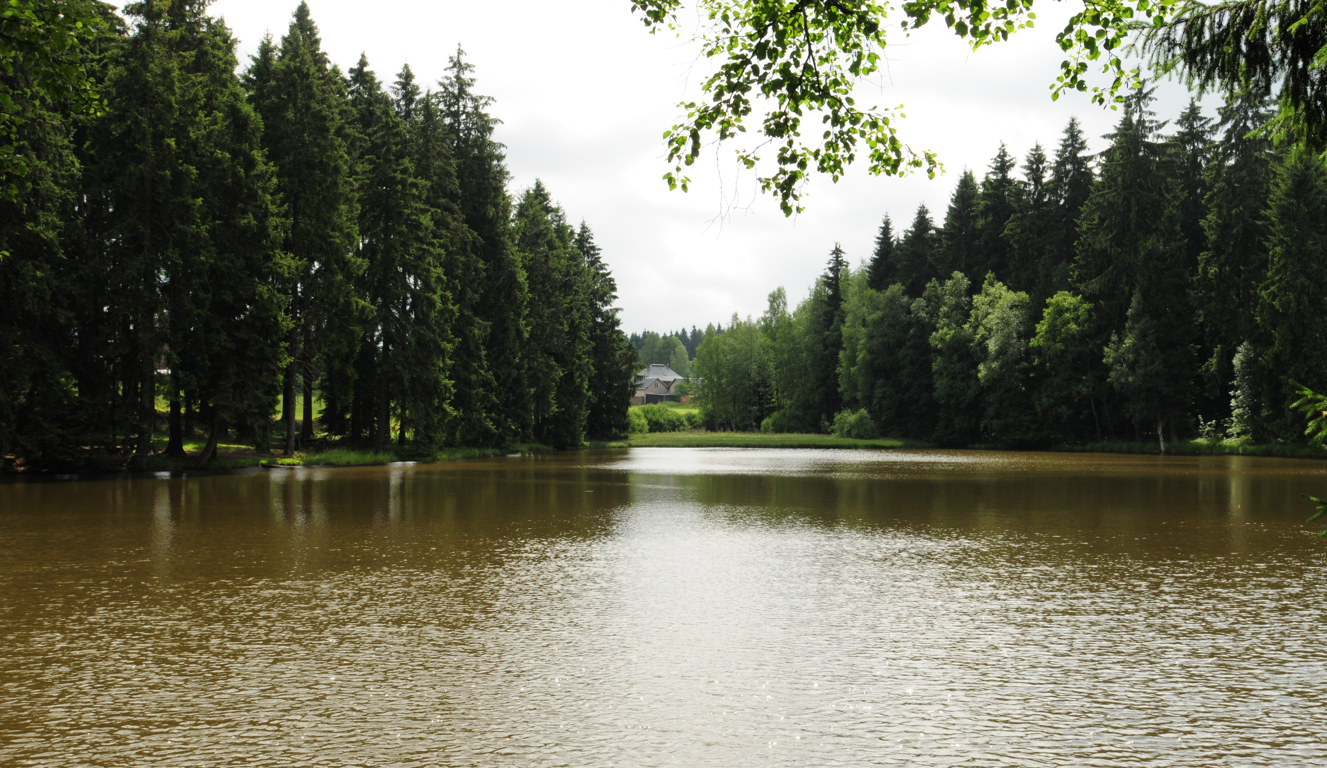 Kottenheide, Blick über den Oberen Muldenteich im Quellgebiet der Weißen Mulde (Stadt Schöneck/Vogtl., Vogtlandkreis, Freistaat Sachsen)